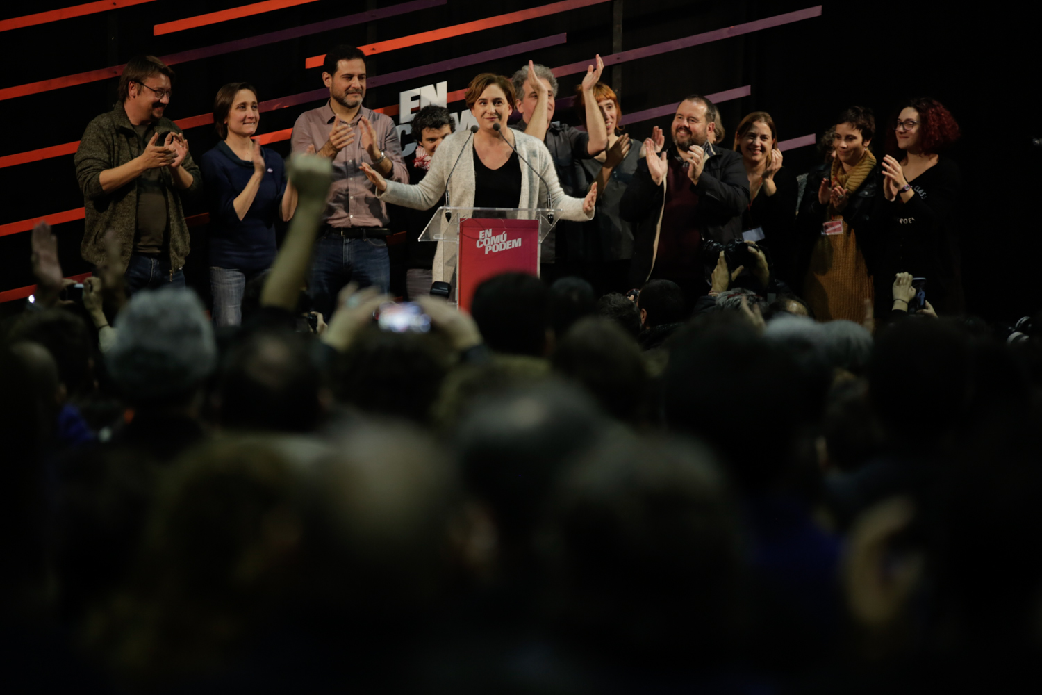 Estació del Nord, Barcelona 20/12/2015 Foto; Georgie Uris Nit electoral eleccions generals espanyoles 20 de desembre 2015. Àlbum d'En Comú Podem